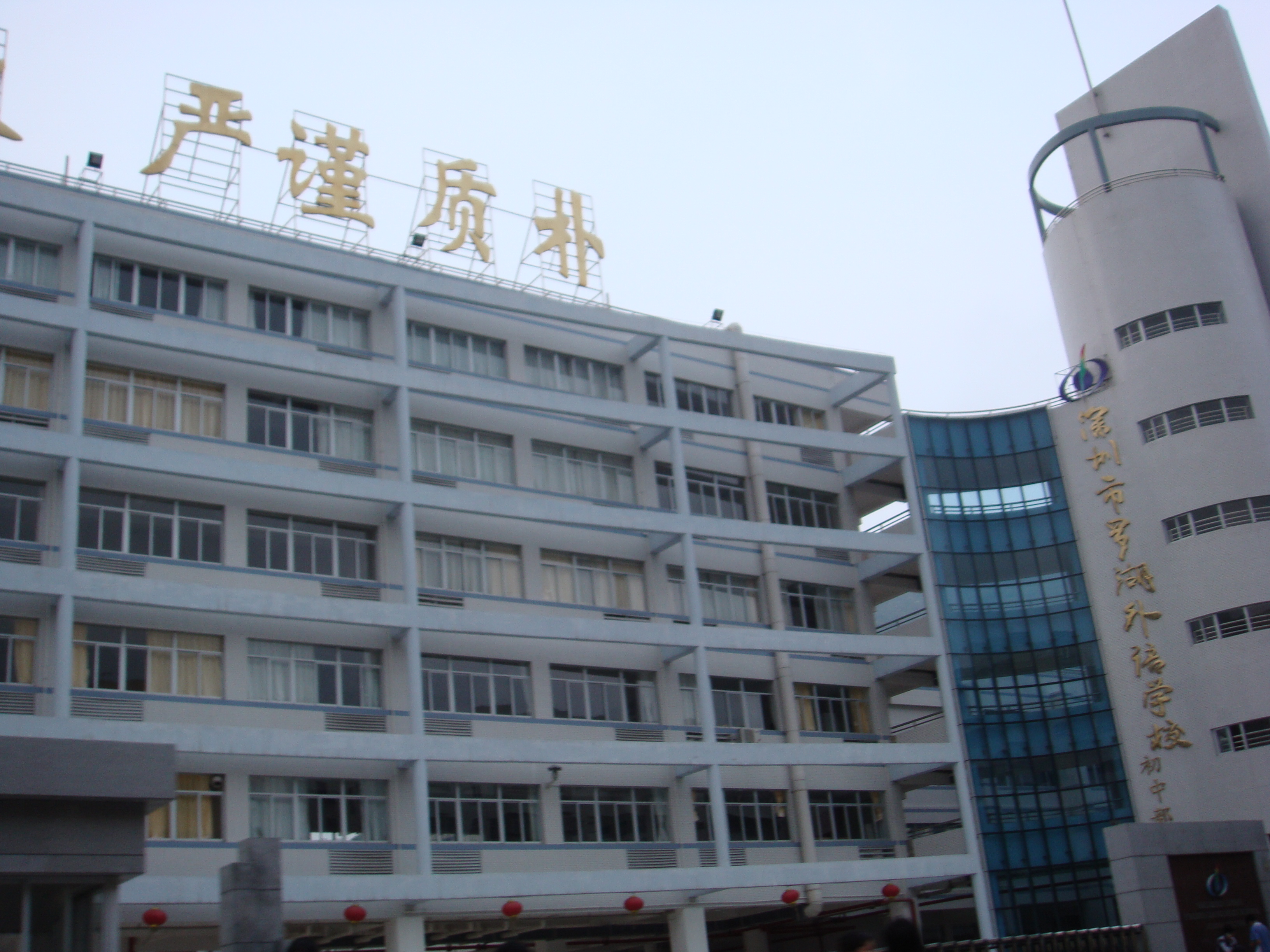 羅湖外語學校分部